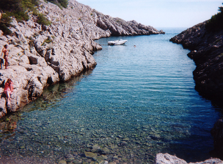 Cala Ferriola im Montgri Masssiv